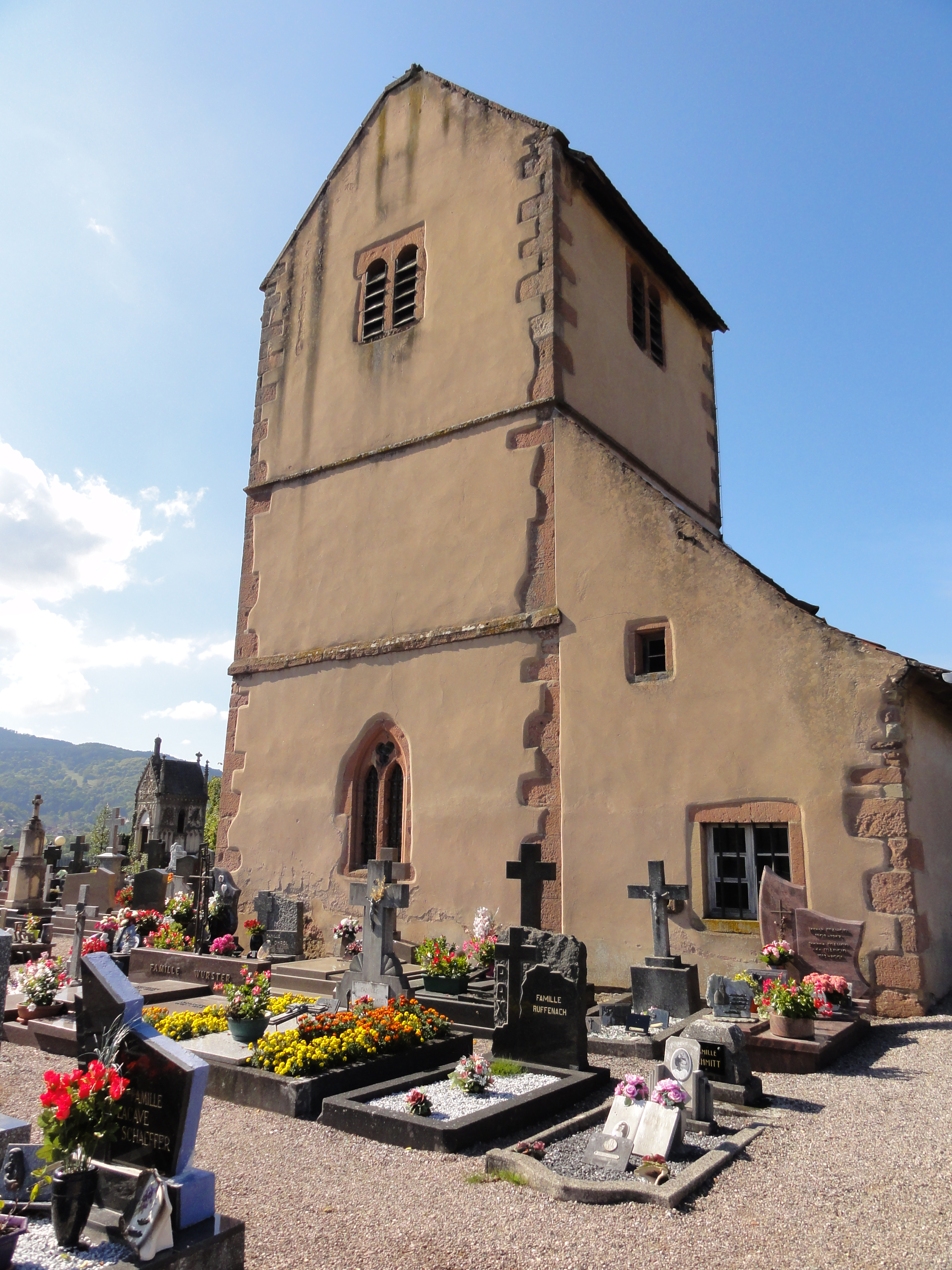 Alsace, Bas-Rhin, Wisches, Église Saint-Antoine (XIIIe-XVIe), actuellement chapelle de cimetière ((IA67013051).